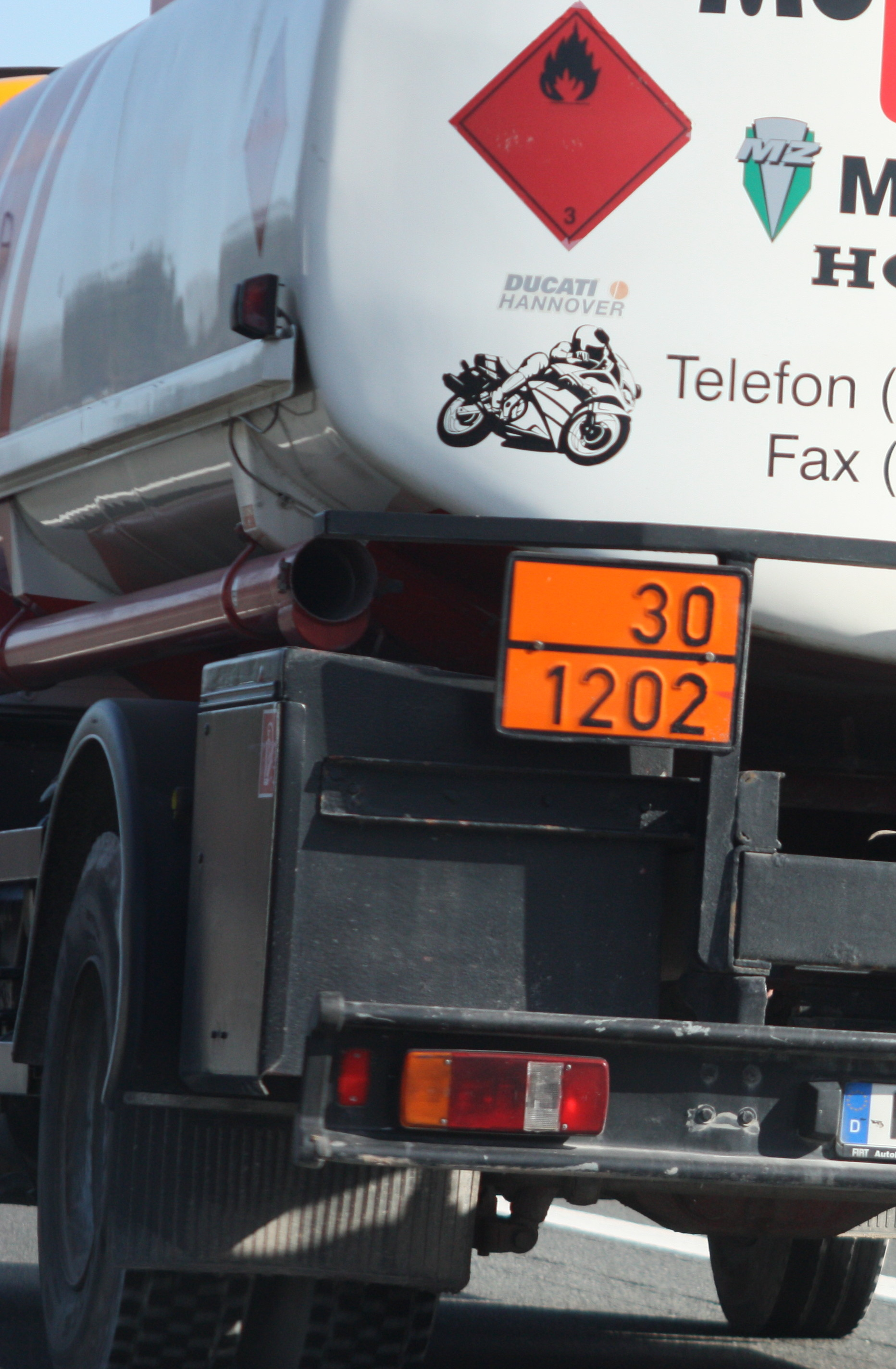 Gefahrguttafel 30 1202, Autobahn